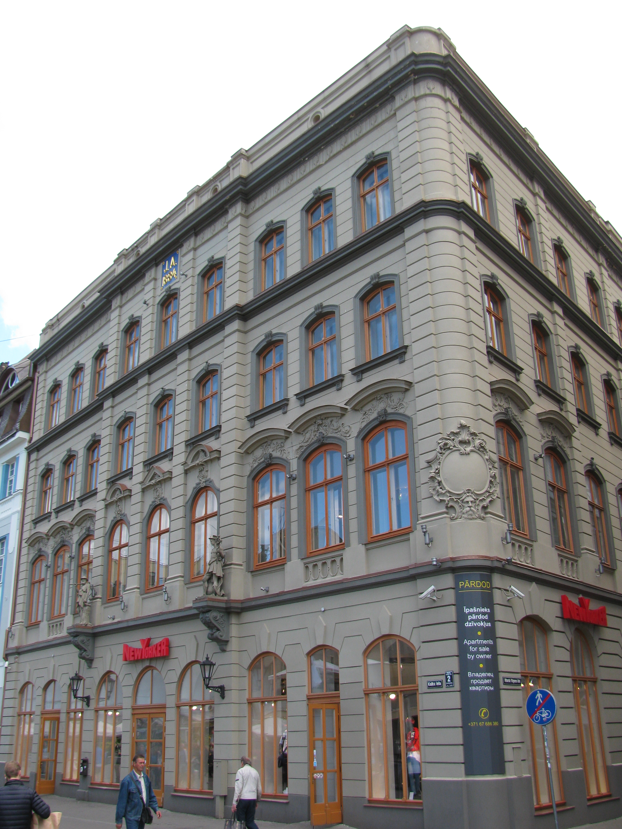 Dzīvojamās ēkas un biedrības "Muse" komplekss, Rīga, Riharda Vāgnera iela 2; Riharda Vāgnera iela 4; Kaļķu iela 18